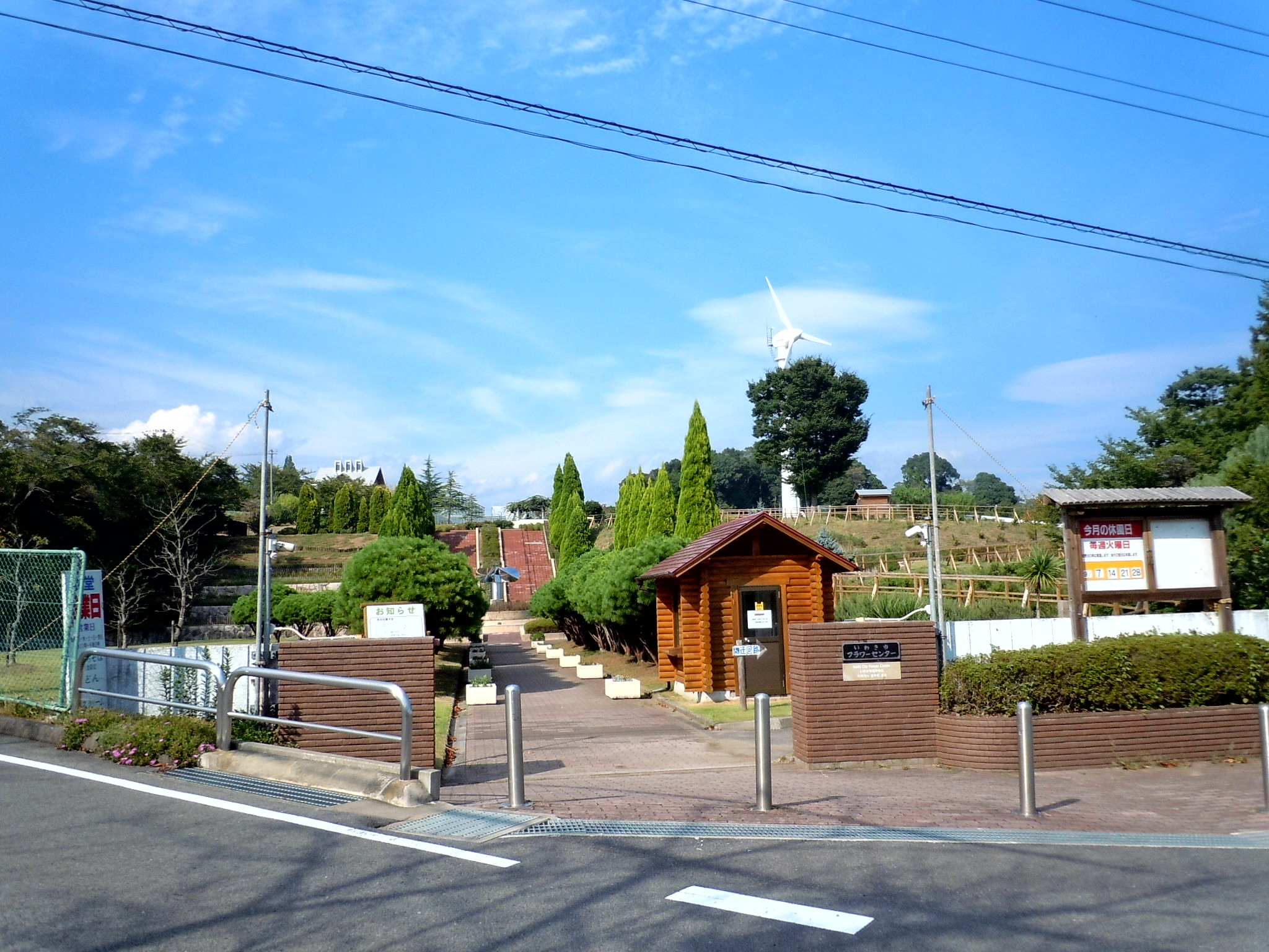 いわき市フラワーセンター